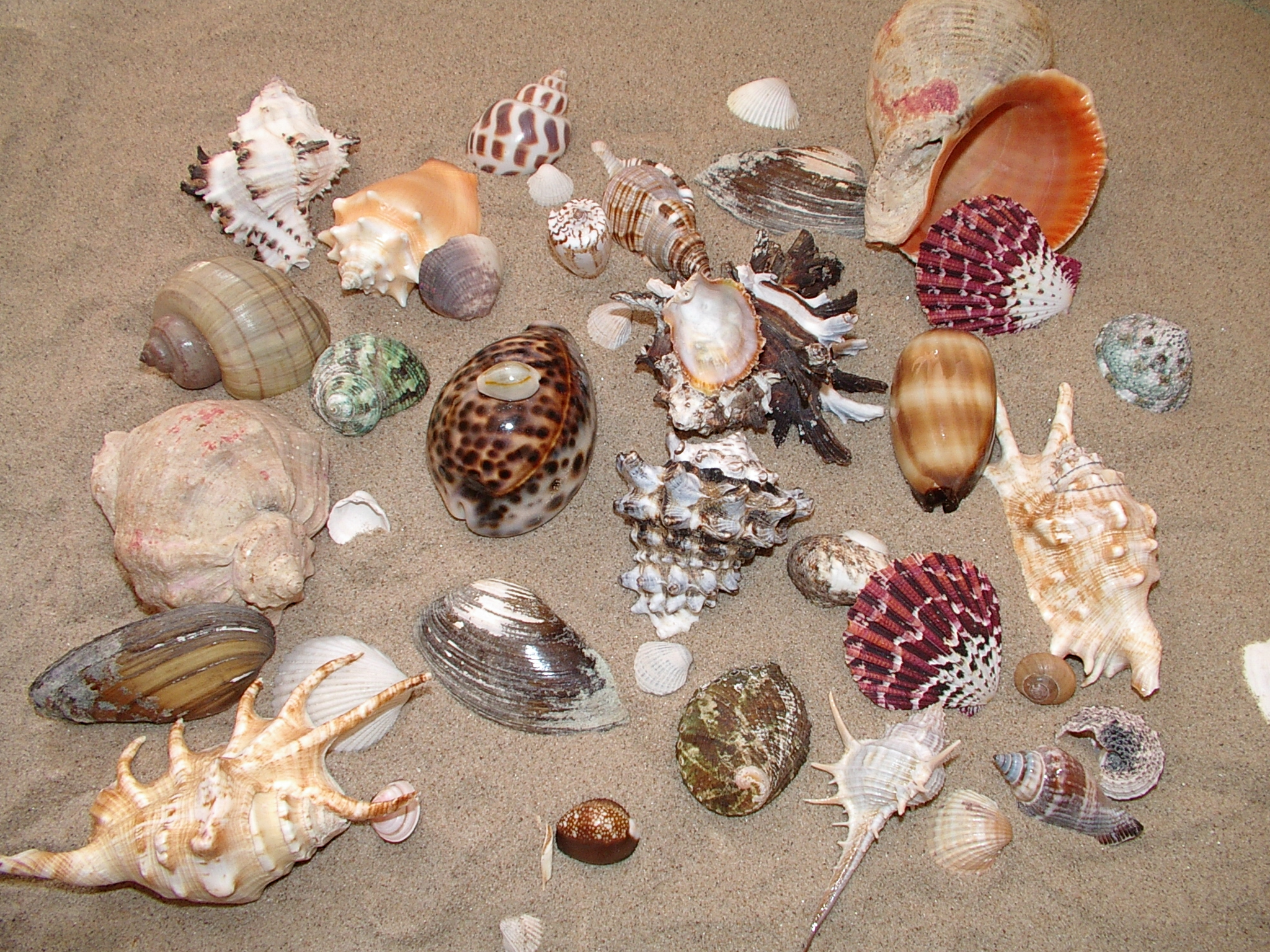 Różne przykłady muszli zwierząt